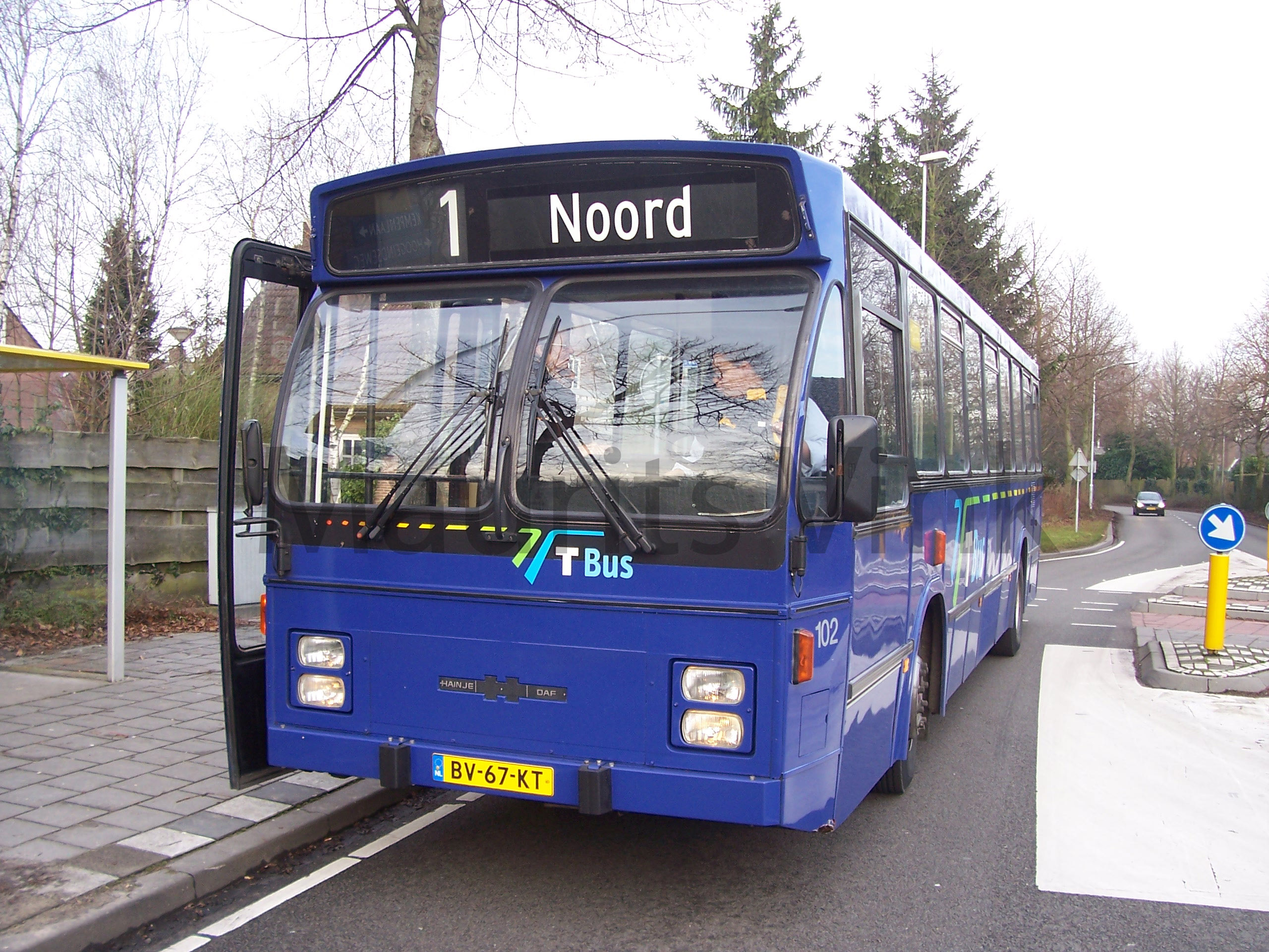 BBA 102 Goirle Nieuwe Rielseweg. Halte bij de ingang van de Hellen op de hoek Kempenbaan, Nieuwe Rielseweg, Hoogeindseweg en Haneven.